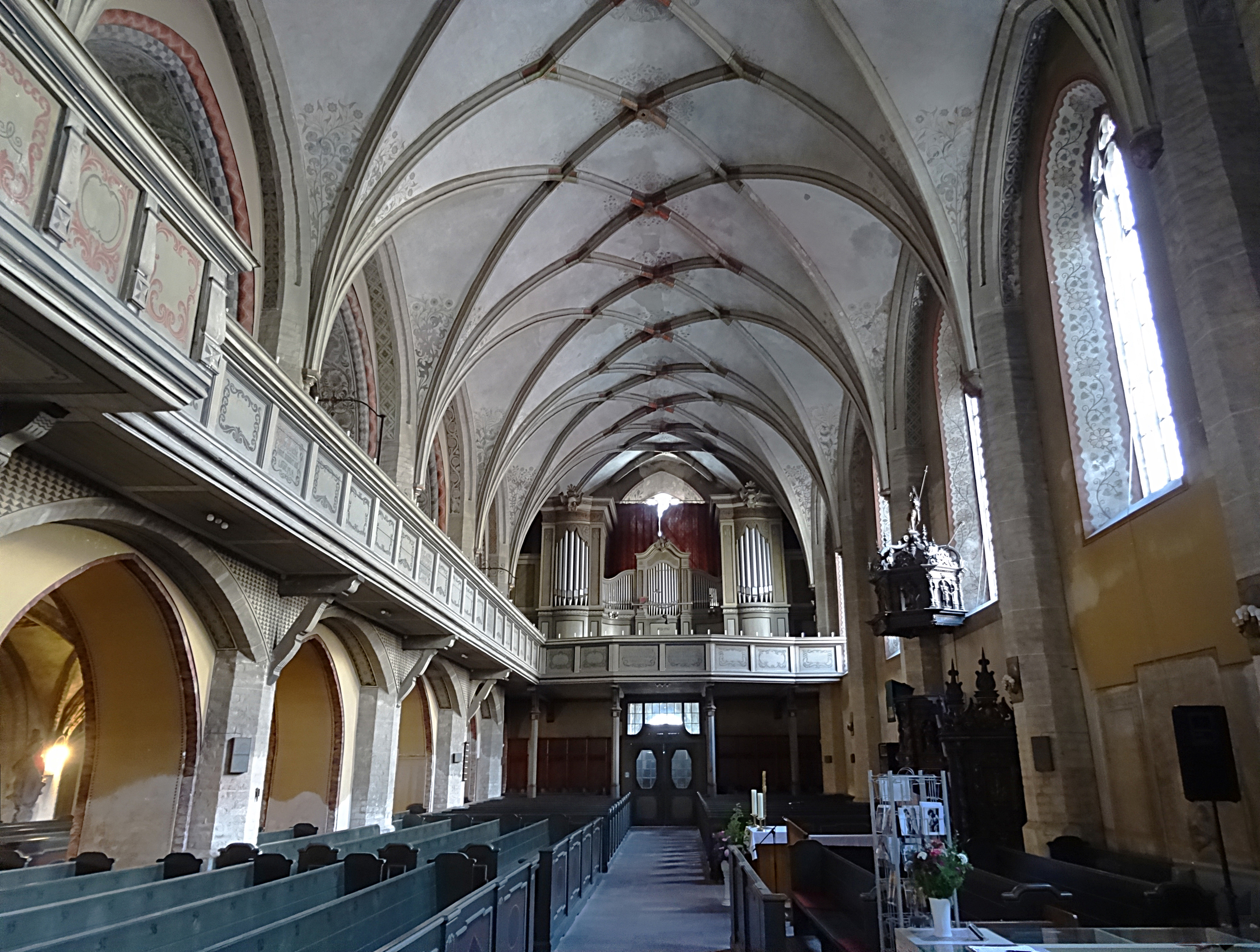 Hauptschiff der Dreifaltigkeitskirche (Görlitz), Blick nach Westen